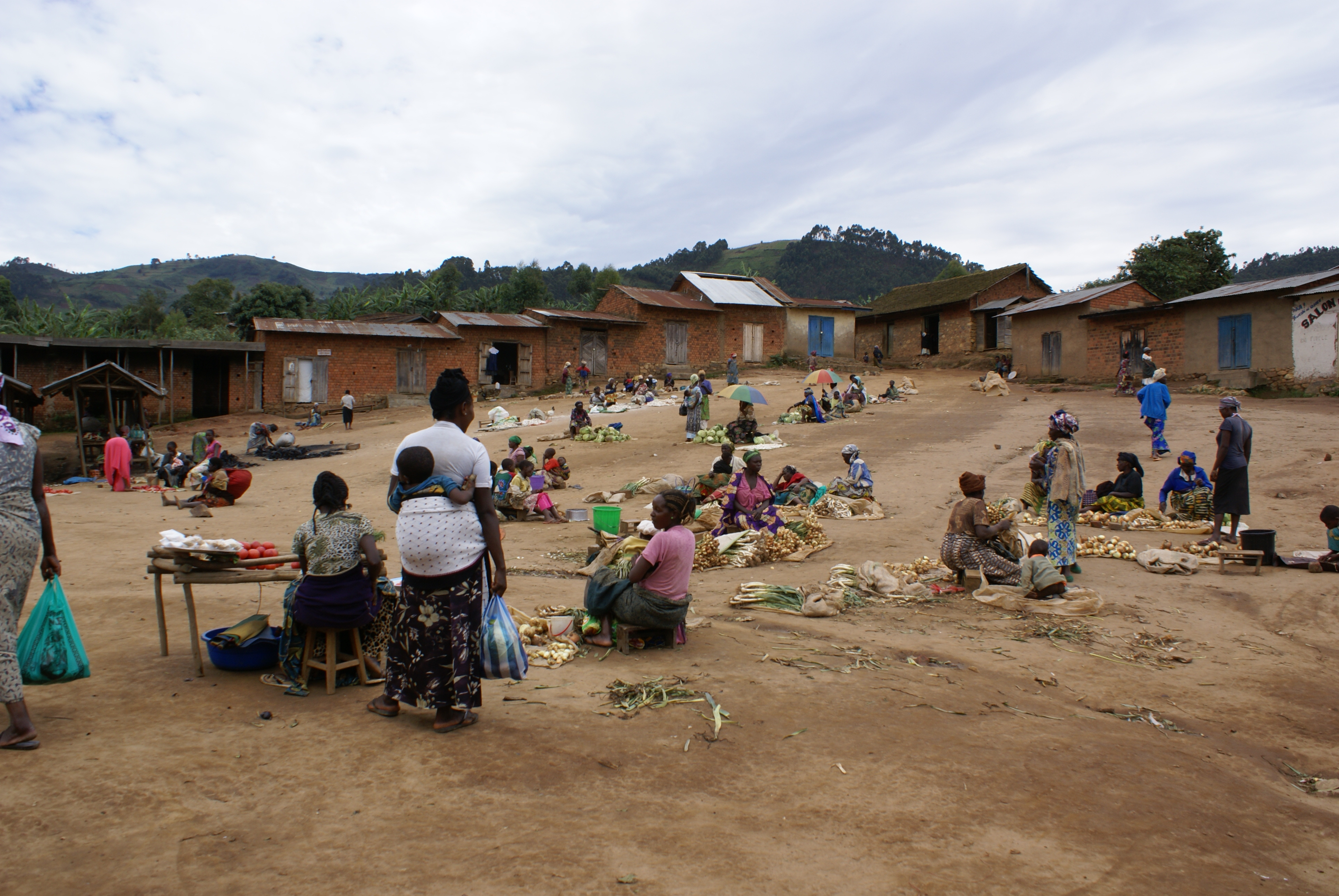 Butembo est une de ville de la République Démocratique du congo. Et dans ce marché, plusieurs femmes sont vendeuses que des hommes, les femmes occupent une grande majorité des activités de vente. This is an image of "African people at work" from Democratic Republic of the Congo